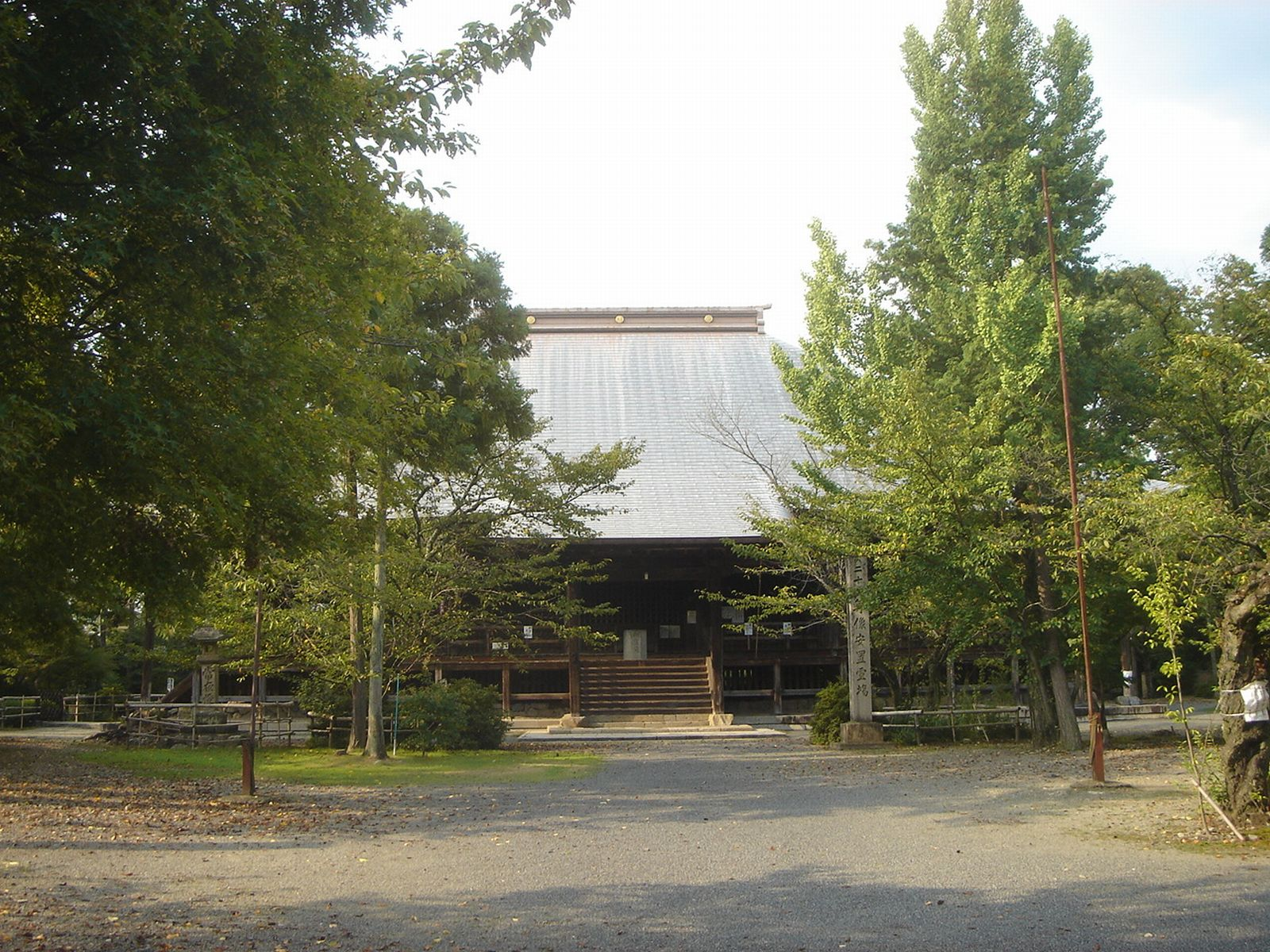 Ganko-ji(Temple)(願興寺),Mitake,Gifu,Japan(岐阜県御嵩町)で撮影。